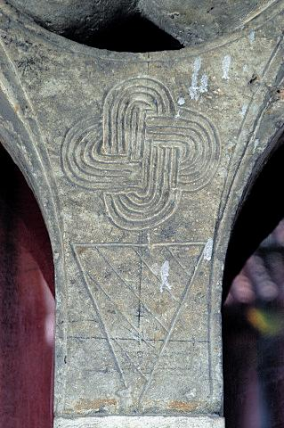 Lo stemma dei Castropola